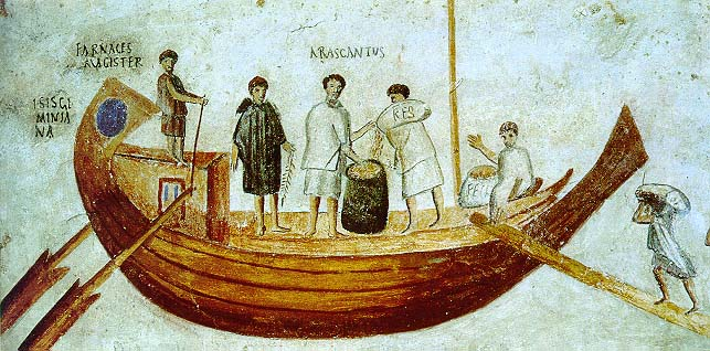 Isis Geminiana fresco, Ostia Antica, Roman Empire.